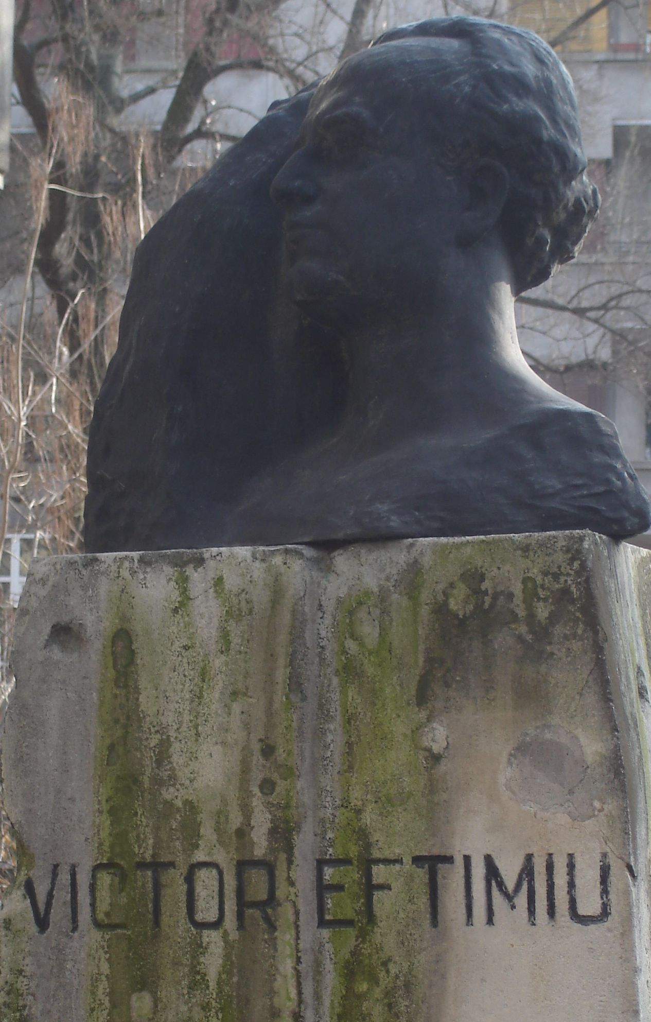 Бюст на Виктор Ефтимиу.